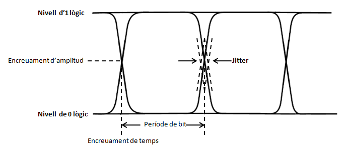 Parametres_fonamentals